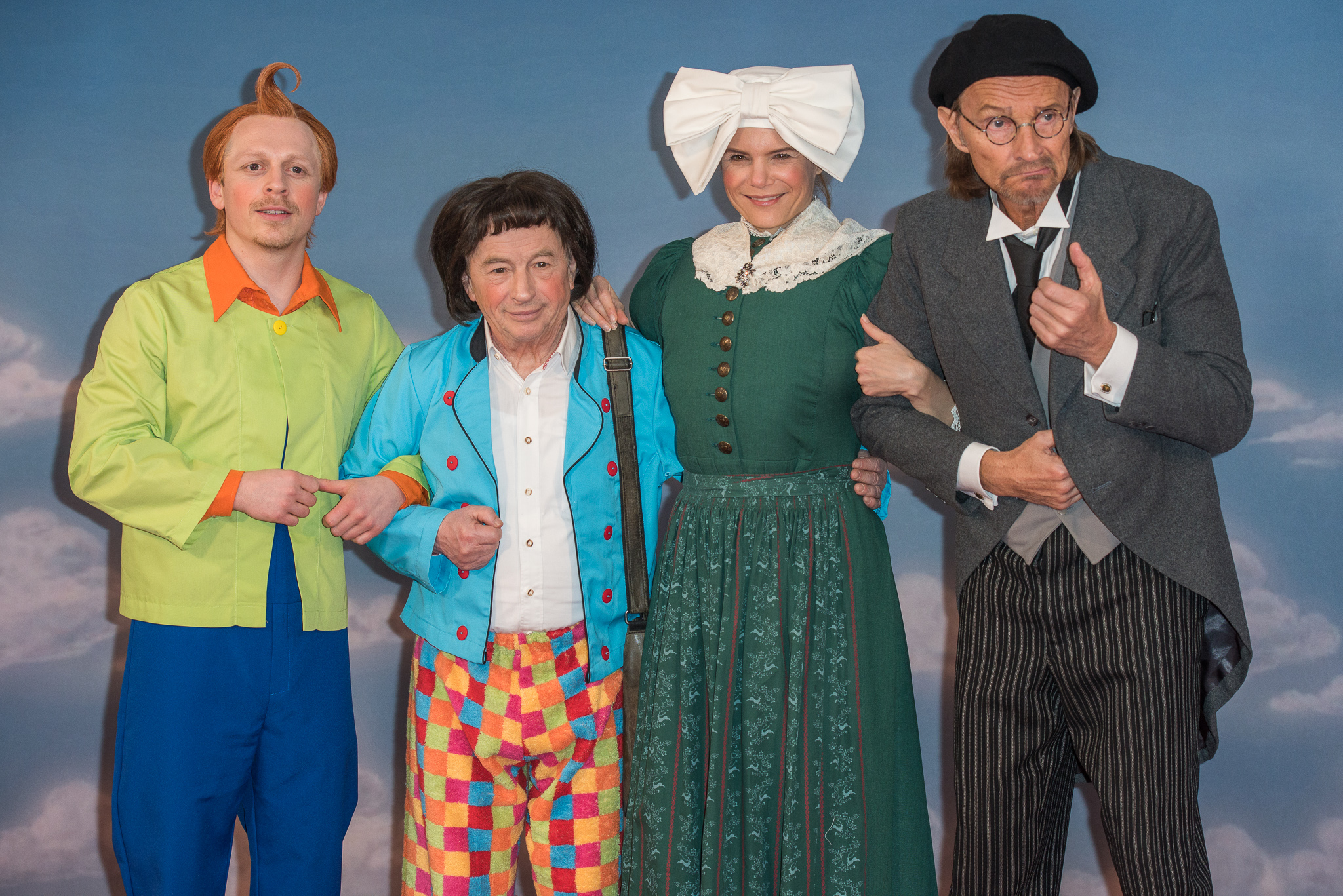 BR,Bayerisches Fernsehen,Eisi Gulp,Fastnacht in Franken,Fastnachts-Verband Franken,Ferdinand Schmidt-Modrow,Gerd Lohmeyer,Karneval,Live-Sendung,Mainfrankensäle,Silke Popp